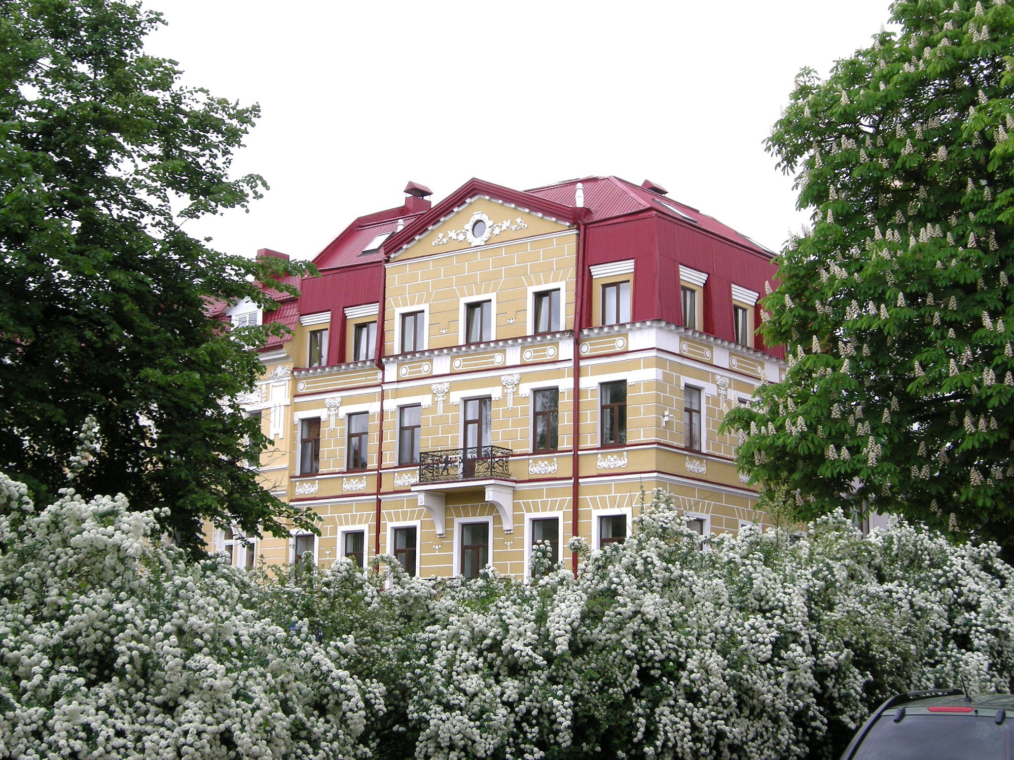 Житловий будинок (мур.) на вул. Гетьмана Сагайдачного, 9 у Тернополі. Нині тут — редакція газети «Вільне життя плюс».